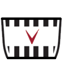 مصرى: شعار نادي فيسل كوبه